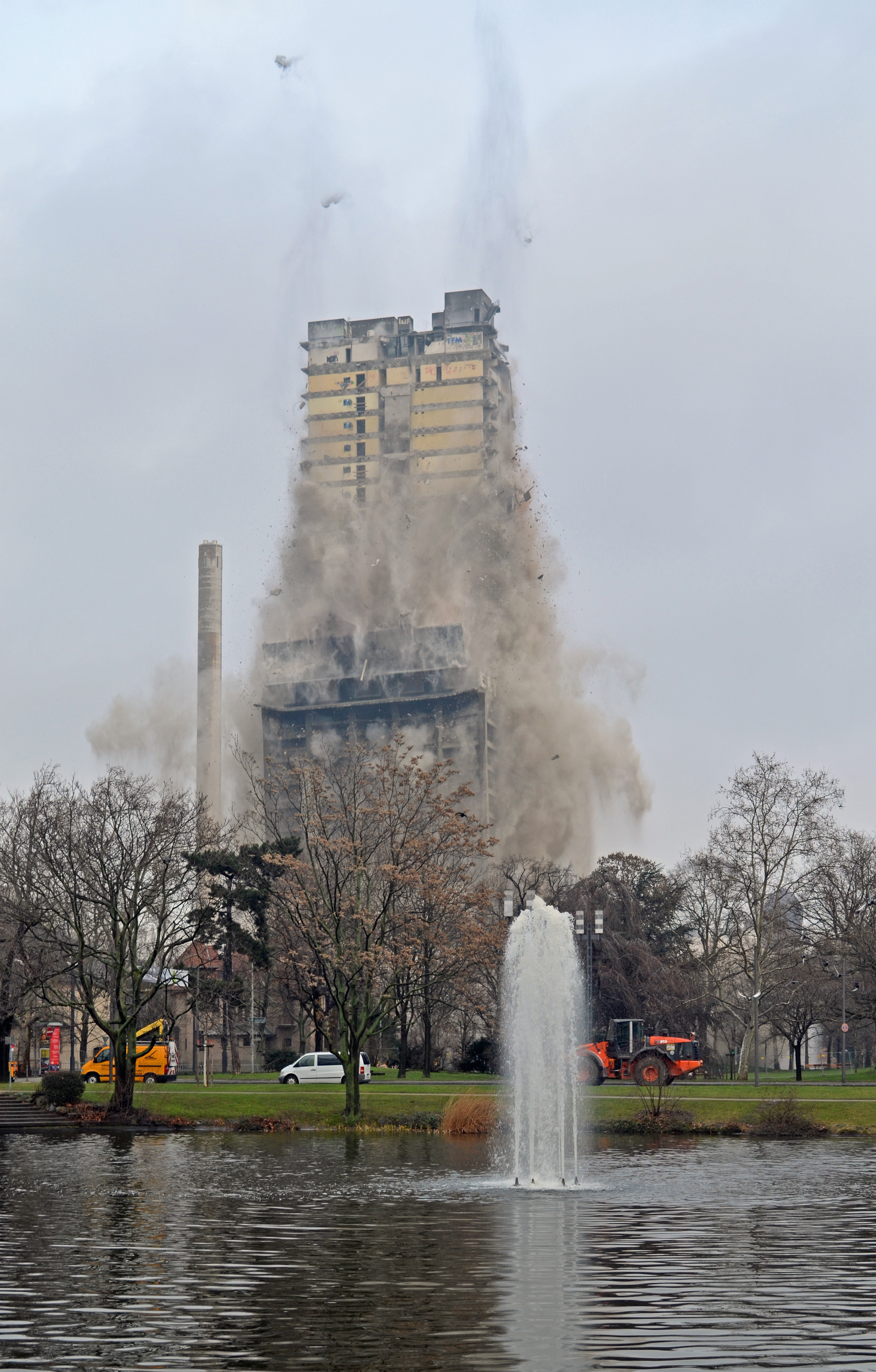 Frankfurt, AfE-Turm-Sprengung